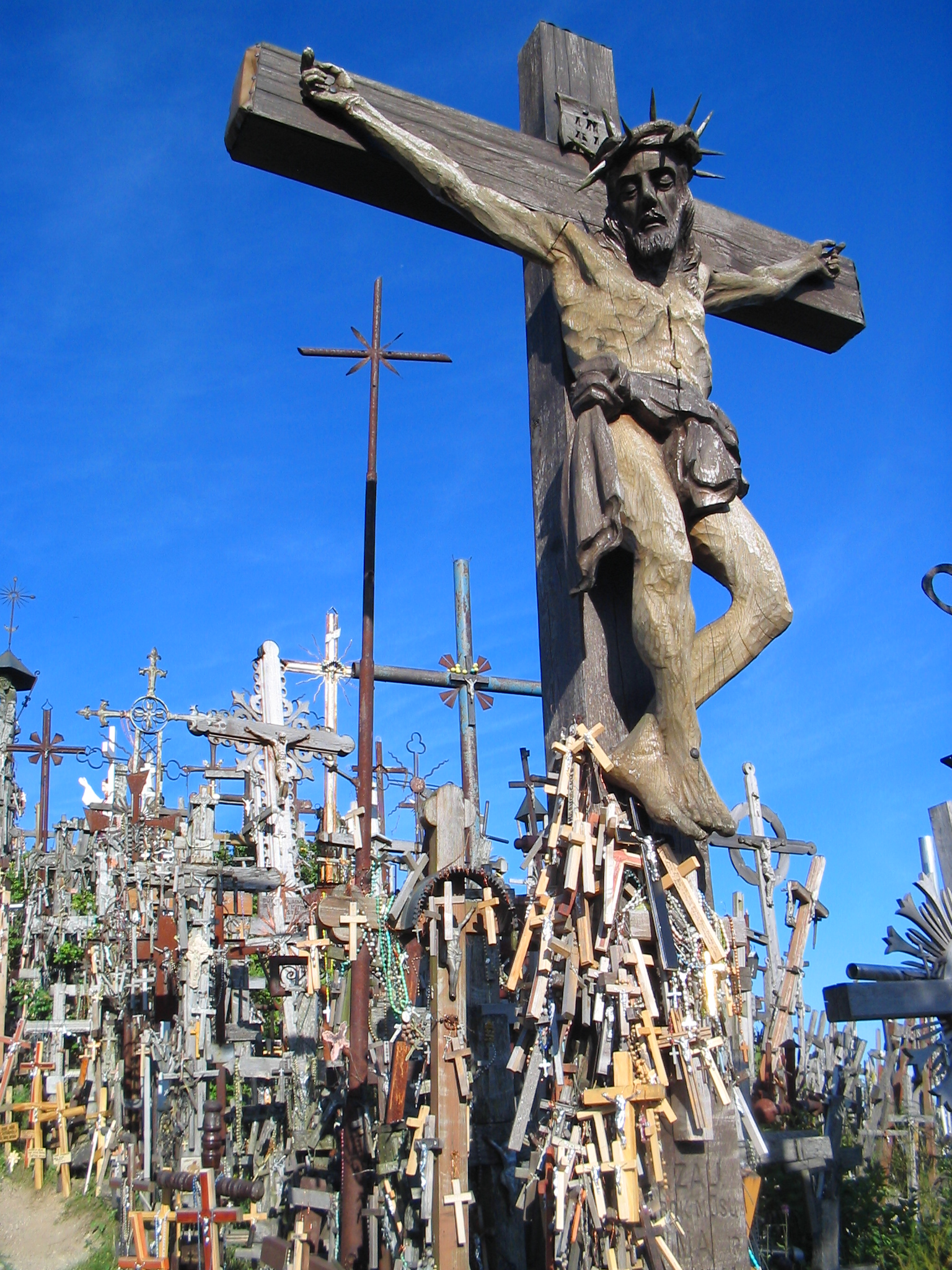 Berg der Kreuze in Litauen; Ansicht mit großen und kleinen Kreuzen